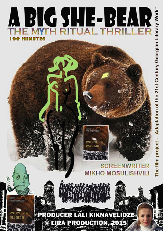 დიდი ძუ დათვი - 2015